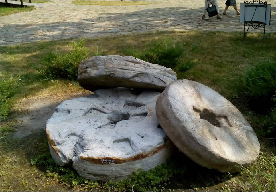 Жорно які знайдені на території Кербутівського монастиря.